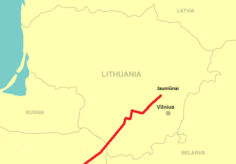 Netikslus Lietuvos-Lenkijos dujotiekio žemėlapis